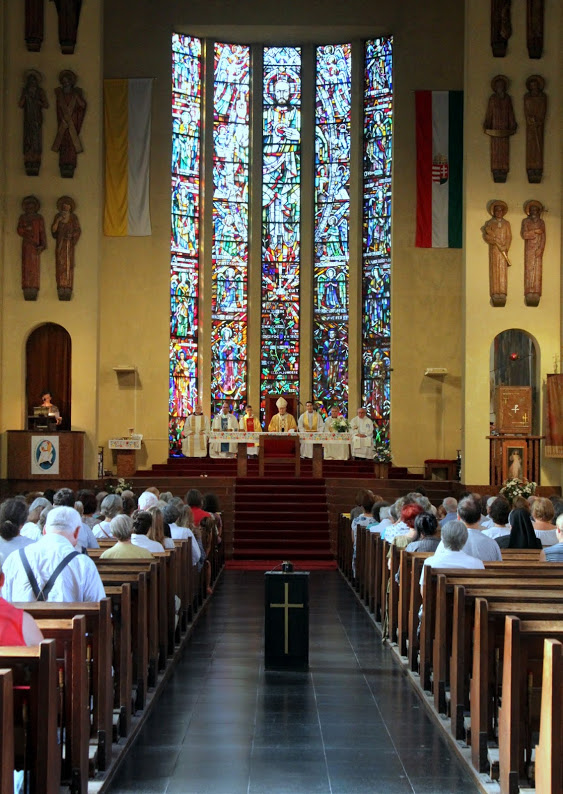 Városmajori templom